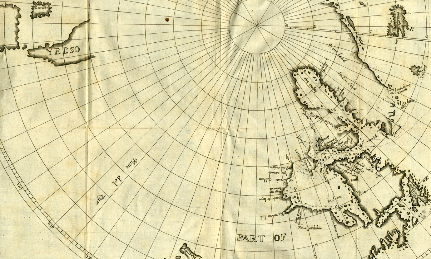 Mapa del viaje de Luke Fox (1586-1635) a bordo del Charles en 1631-32. "North-West Fox, or, Fox from the North-West Passage. Beginning with King Arthur, Malga, Octhur, the Two Zeni's of Iseland, Estotiland, and Dorgia; Following with Briefe Abstracts of the Voyages of Cabot, Frobisher, Davis, Waymouth, Knight, Hudson, Button, Gibbons, Bylot, Baffin, Hawkridge . . . Demonstrated in a Polar Card, Wherein Are All the Maines, Seas, and Ilands, Herein Mentioned. With the Author His Owne Voyage, Being the XVIth ..." Londres, 1635. [Rare Books Division: Kane Collection].